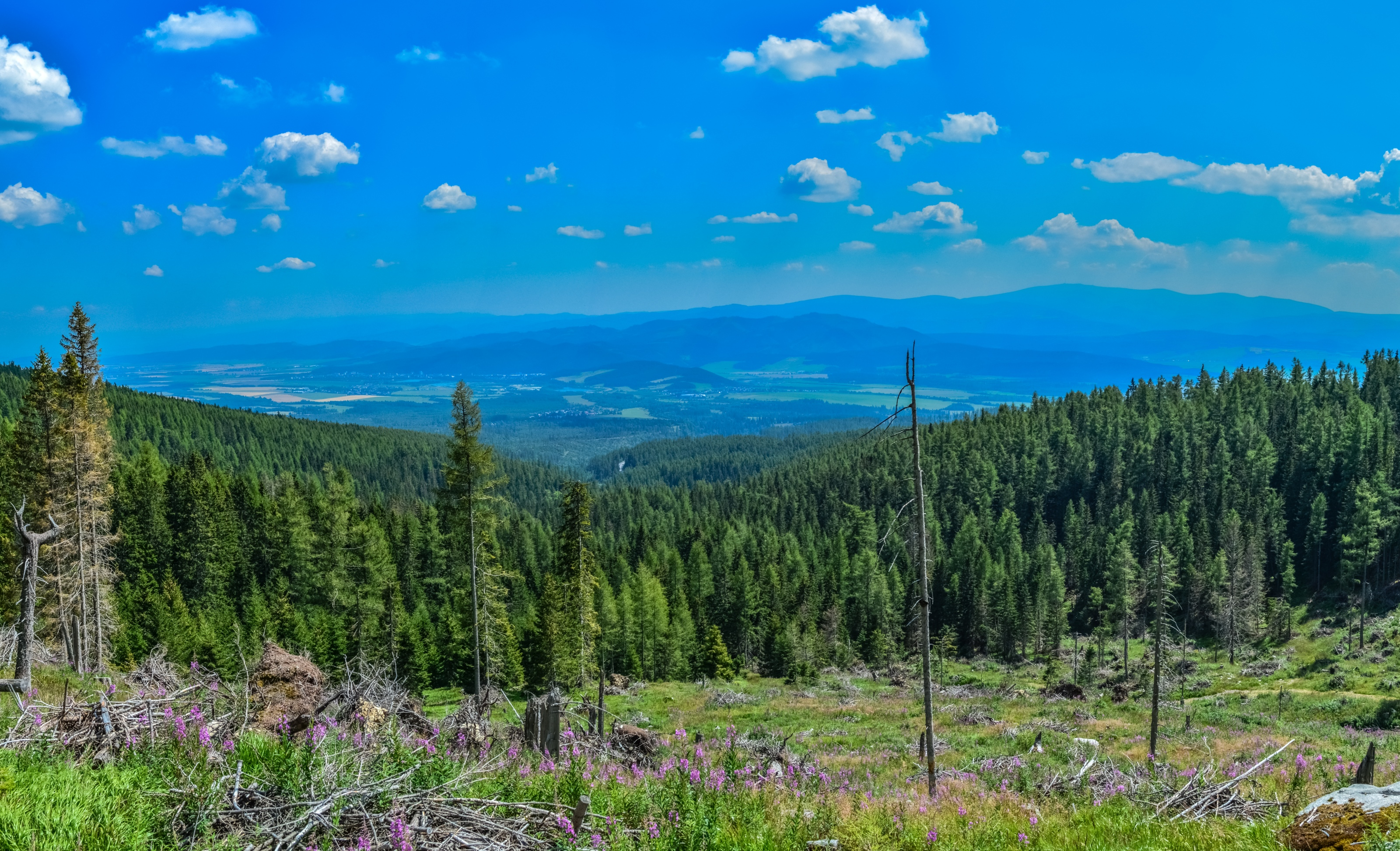 Dolina Veľkého Šumu z nadmorskej výšky 1400 m.n.m.